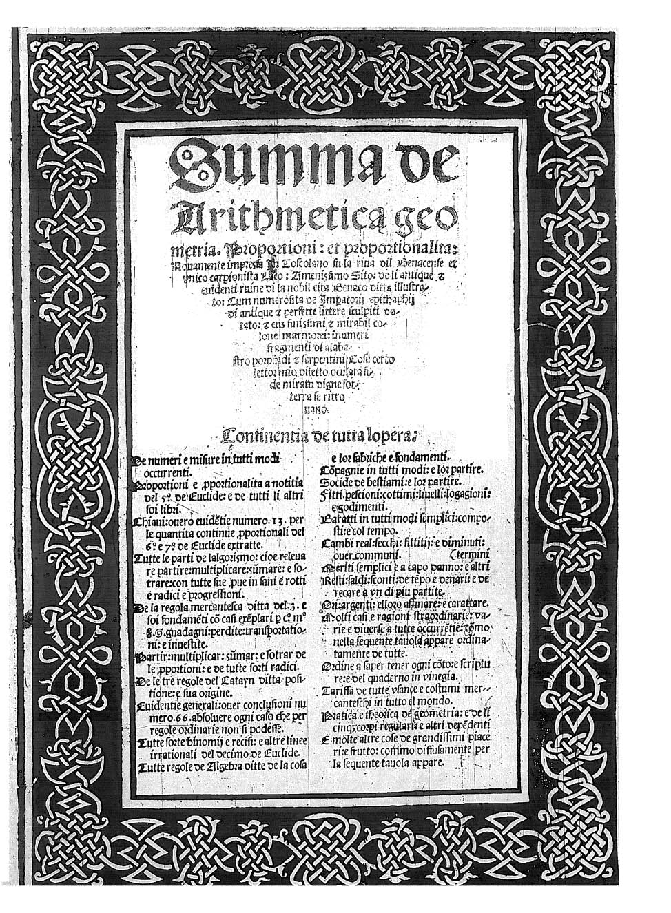 Summa de arithmetica geometria. Proportioni: et proportionalità: nouamente impressa in Toscolano ... Continentia de tutta l'opera. De numeri e misure in tutti modi occurrenti. Proportioni e proportionalita a notitia del 5. de Euclide: e de tutti li altri soi libri .... - (In Tusculano ...) : [s.n.], 1523 (et per esso paganino di nouo impressa ...). - [8], 224, 76 c. : ill. ; fol. - L'identità dell'Autore si desume dalla lettera dedicatoria .